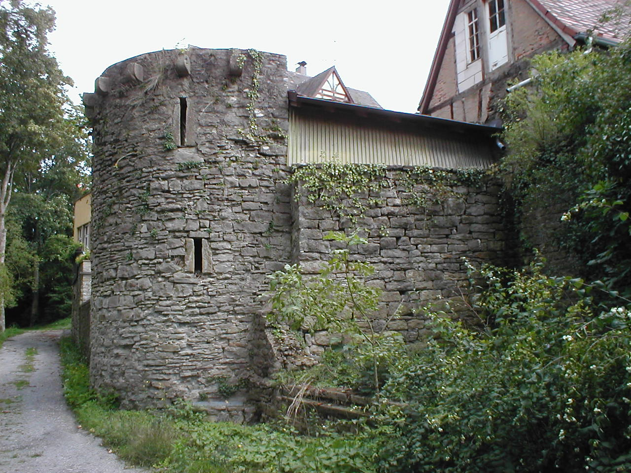 Reste der mittelalterlichen Burgbefestigung an der Komturei bei Schloss Horneck in Gundelsheim